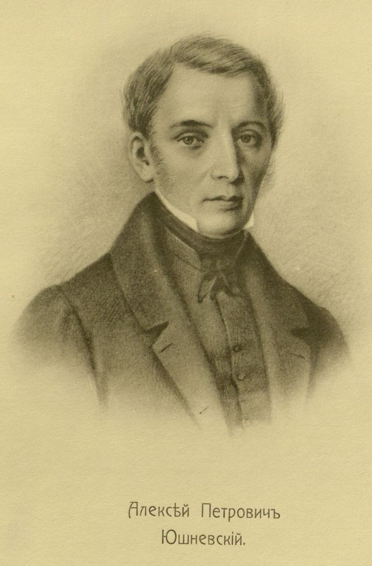 Юшневский, Александр Петрович